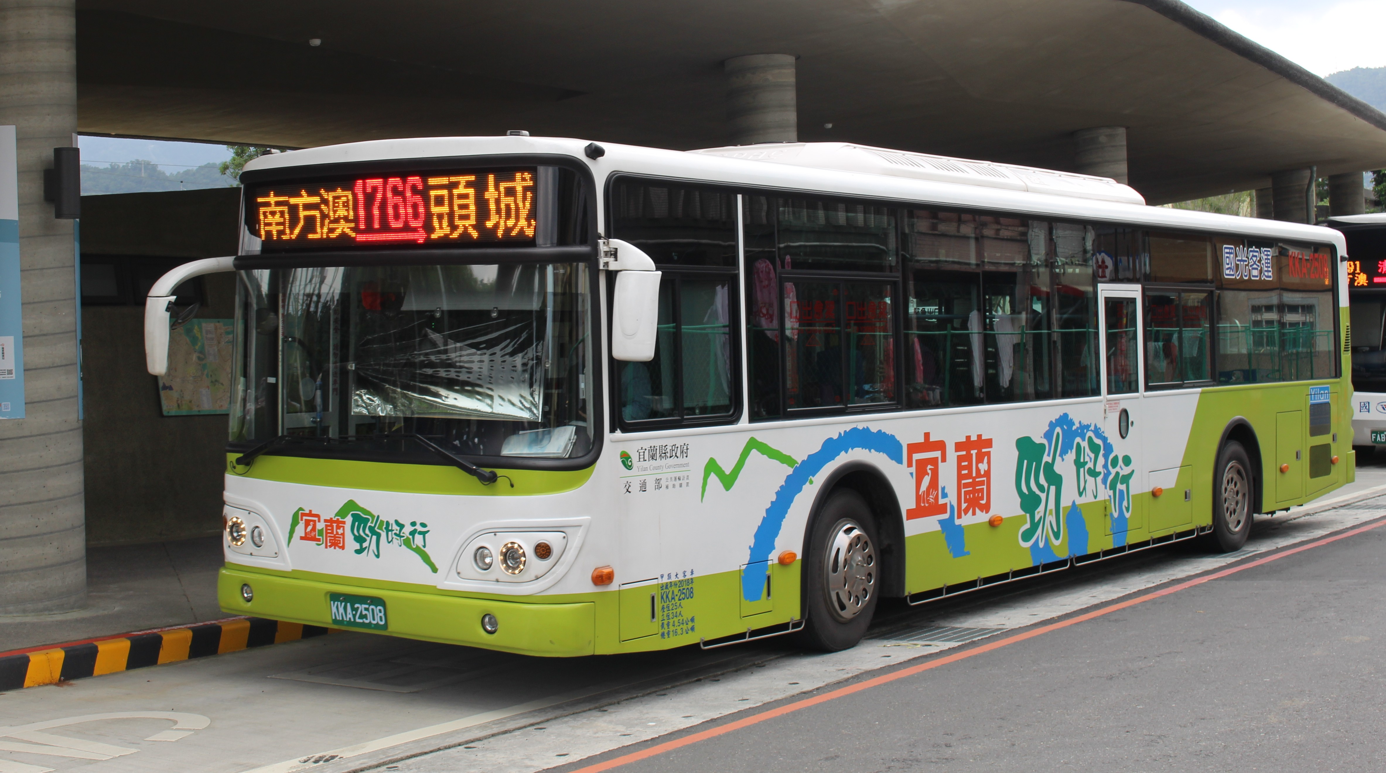 中文（台灣）: 國光客運成運MB120NS大客車KKA-2508行駛1766線